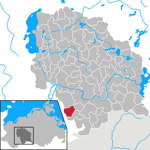 Stolpe in Mecklenburg-Vorpommern - District Parchim